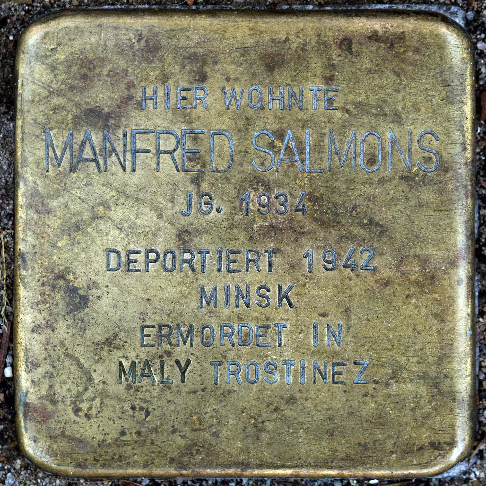 Stolperstein für Salmons, Manfred